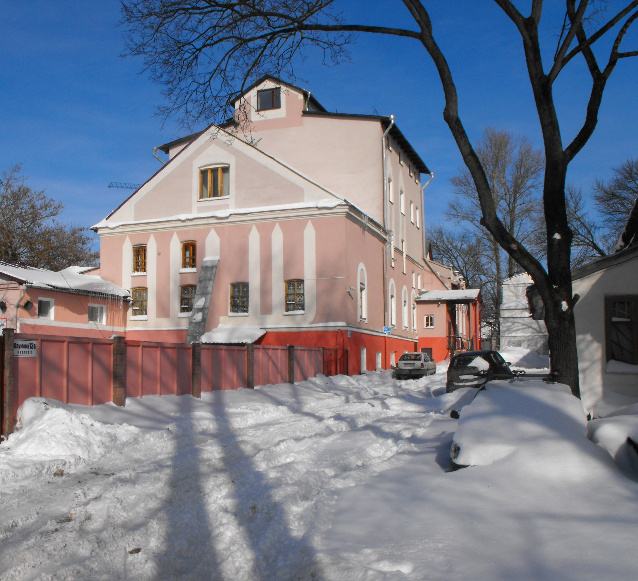 Здание (и синагога) Иудейского религиозного объединения в Республике Беларусь. Улица Даумана, 13Б.